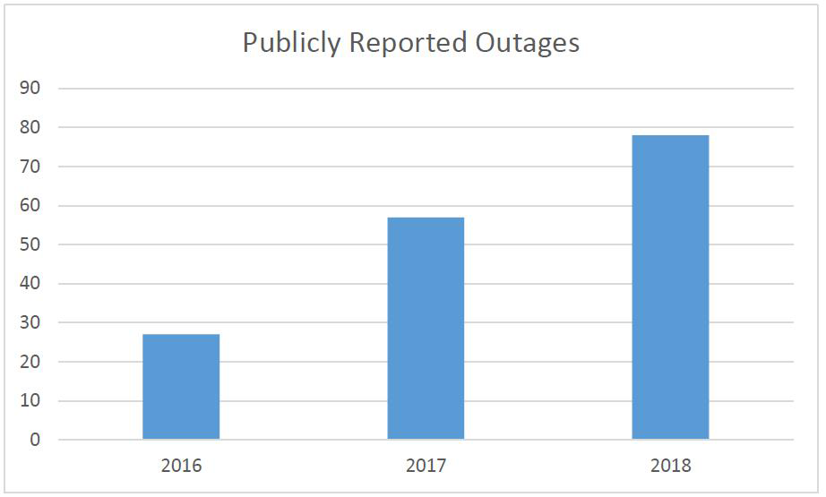 Graphe des incidents sur 3 ans